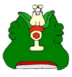 Glifo Náhuatl del municipio de Huasca de Ocampo,Hidalgo